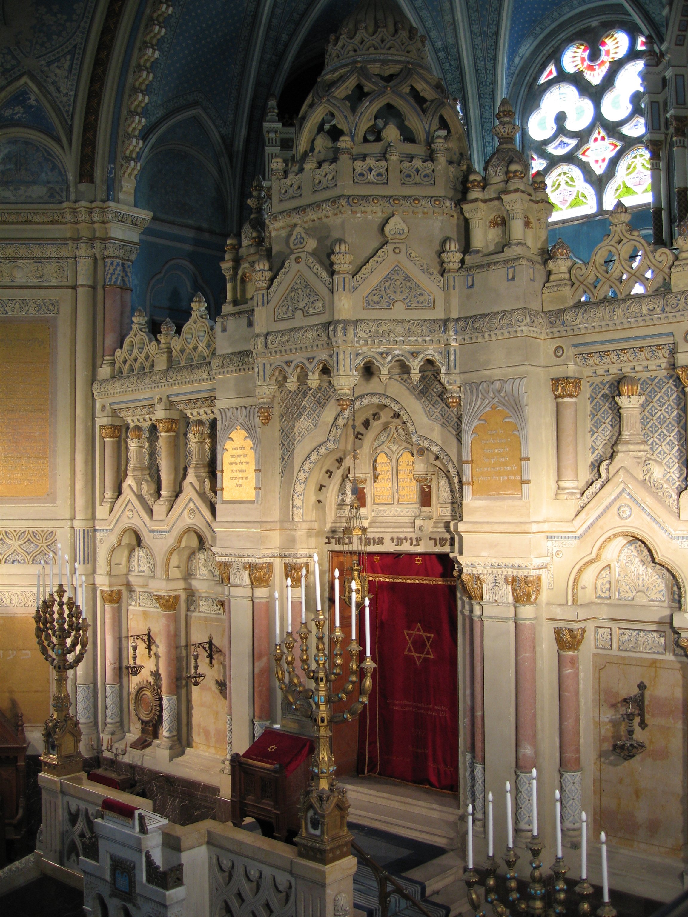 Szeged: új zsinagóga, a Tóra helye